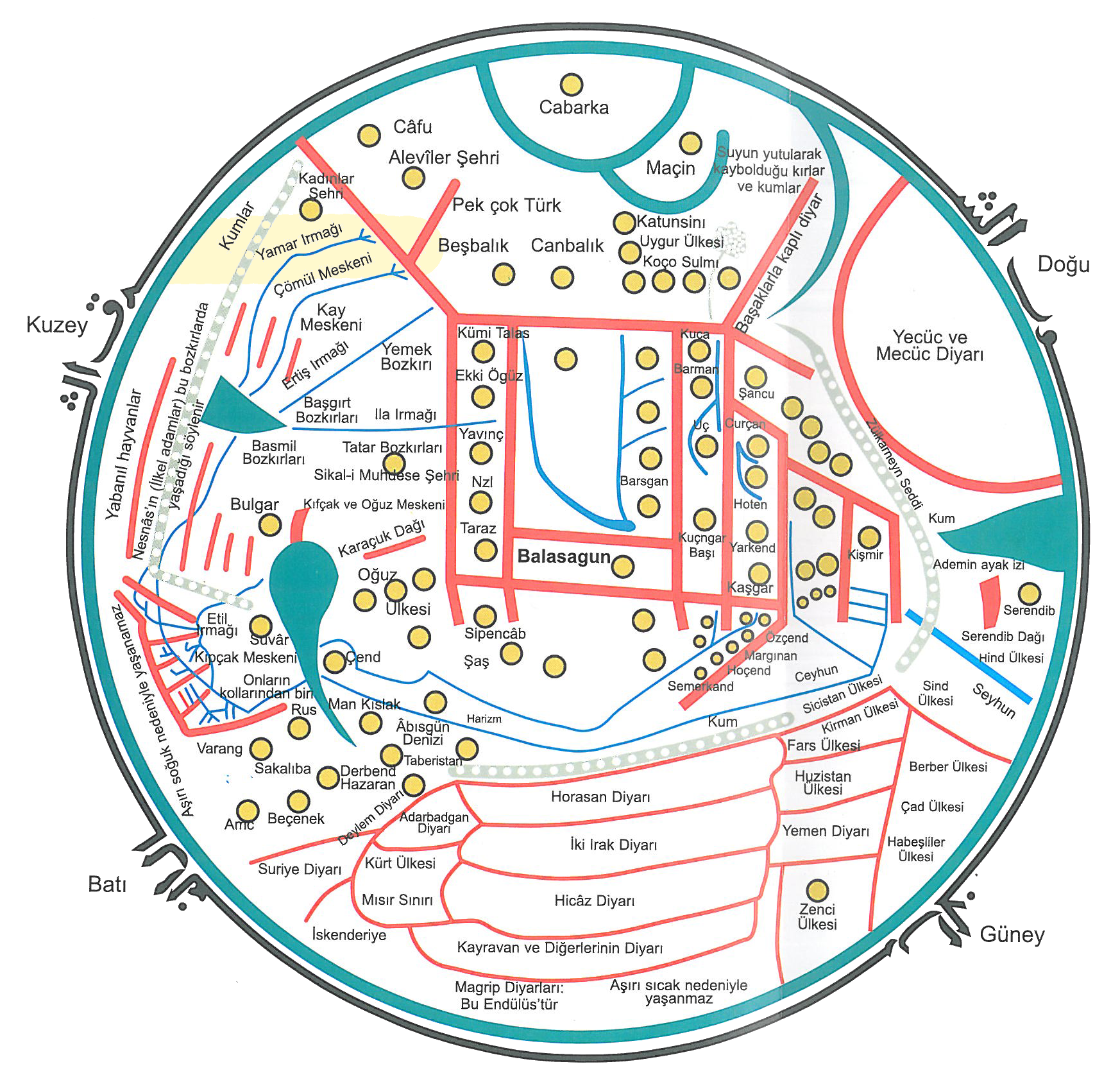 Kaşgarlı Mahmud'un Divânu Lügati't-Türk adlı eserindeki haritanın Türkçeleştirilmiş versiyonu.